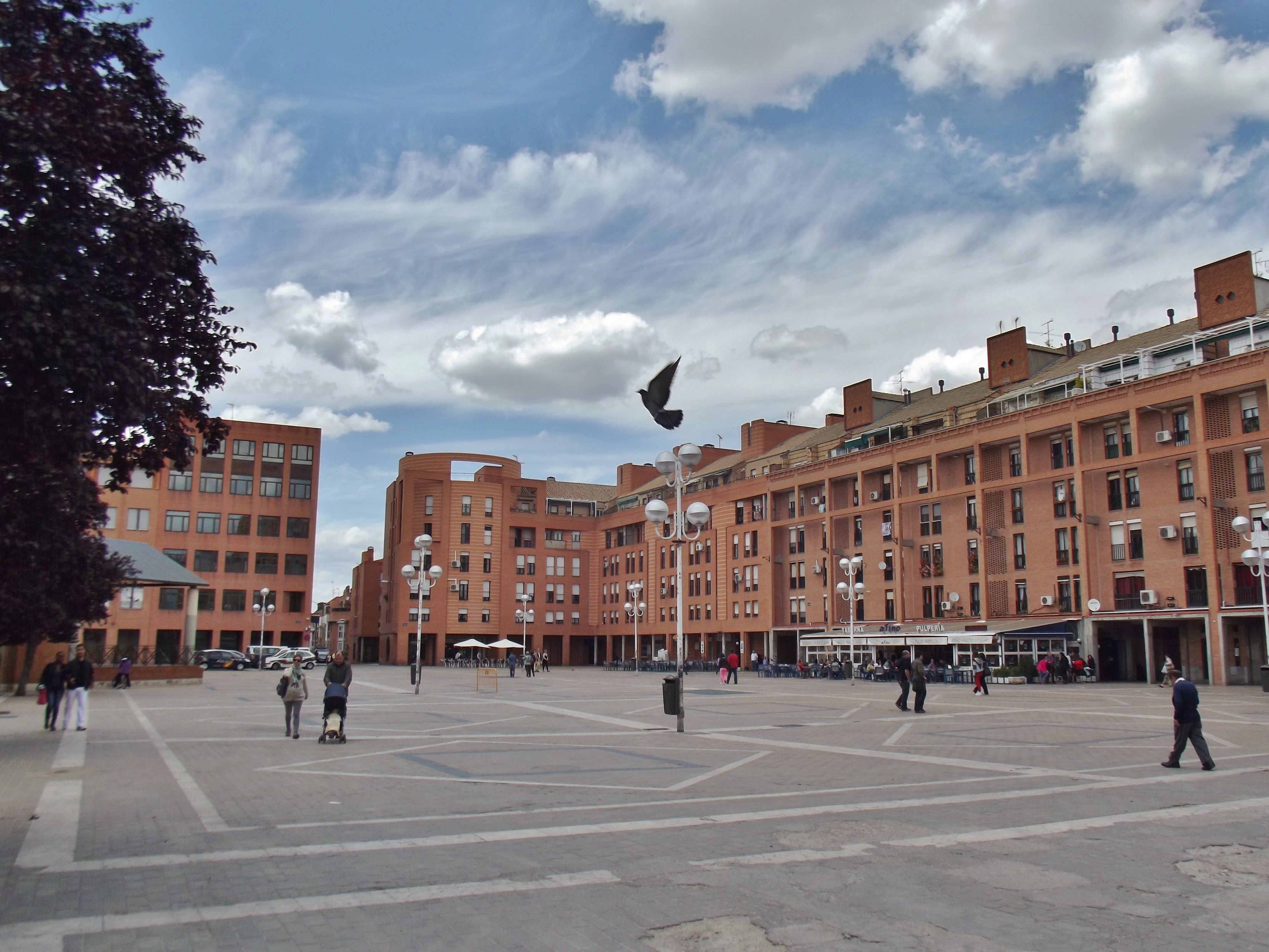 Plaza de la Remonta 28039, Madrid.